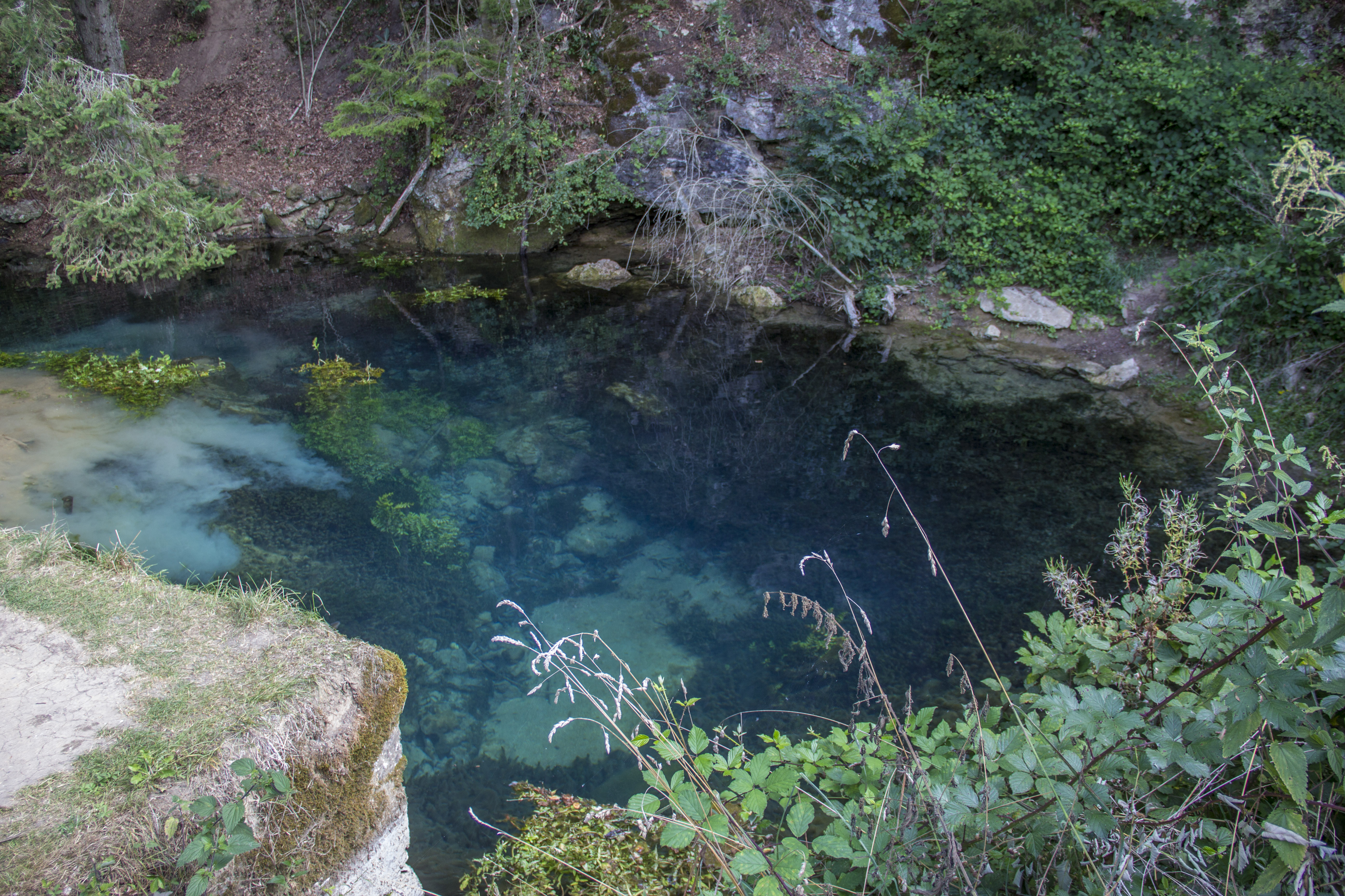 Karstquelle, Geotop, Essing, Weihermühle